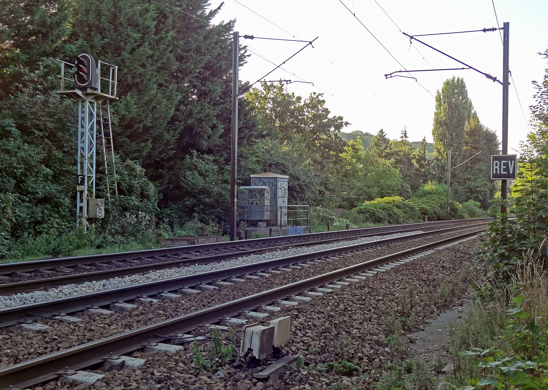 Fin du sectionnement électrique (pancarte REV) de Villennes-sur-Seine (Yvelines), France.